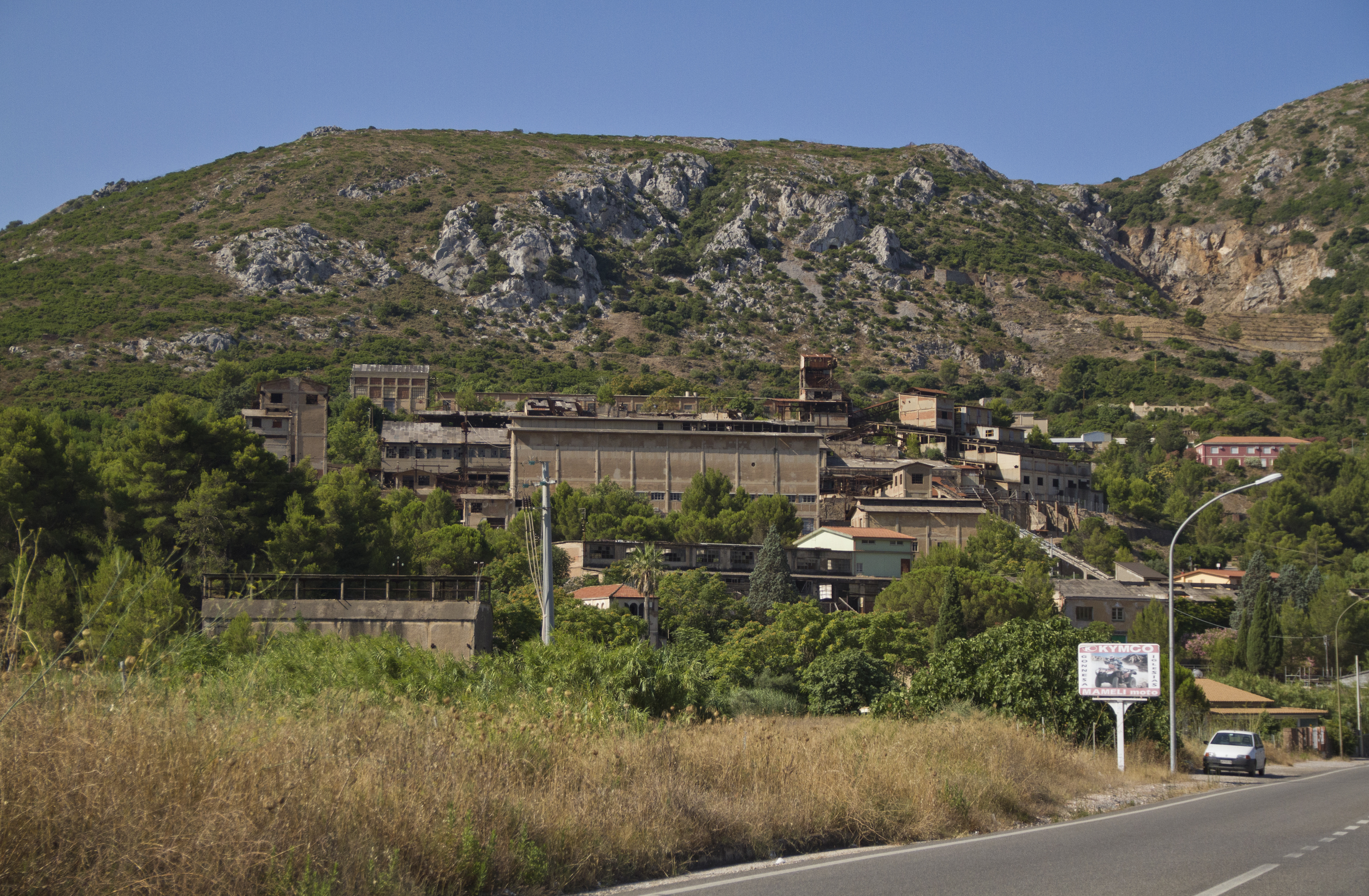 Miniera di San Giovanni, Bindua, Carbonia-Iglesias, Sardinia, Italy